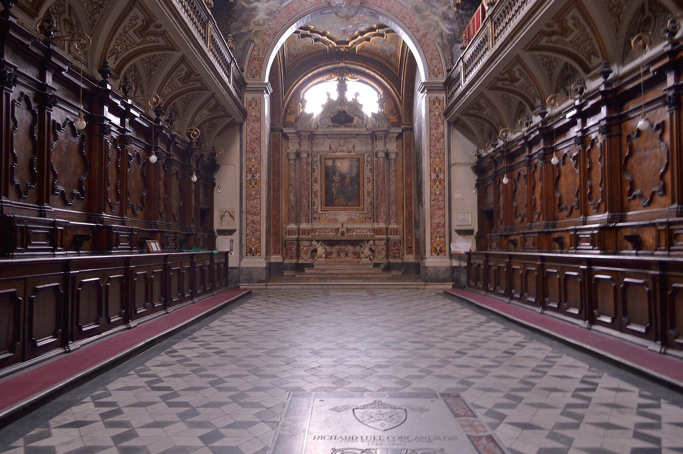 Sacrestia di San Domenico Maggiore (Napoli)